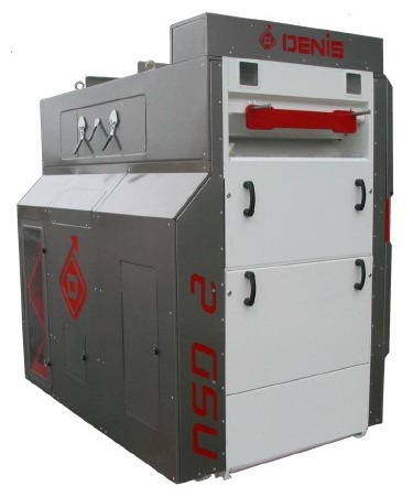 Плоско-решётная зерноочистительная машина